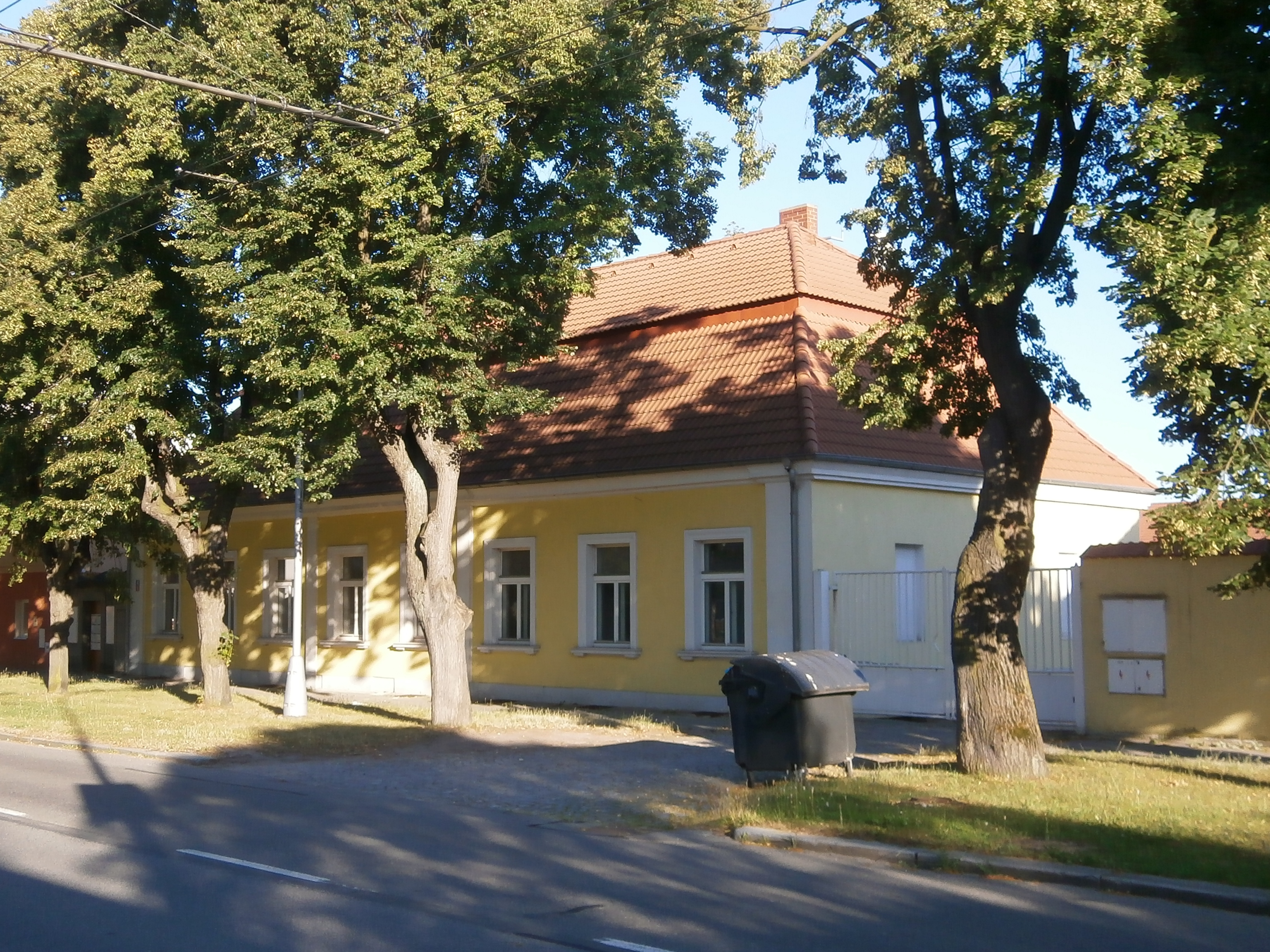 Pražská třída čp. 51